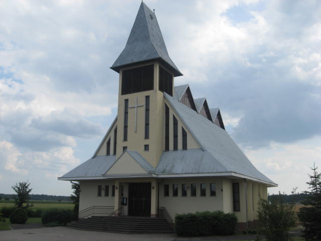 Kościół Ducha Świętego w Laskowicach